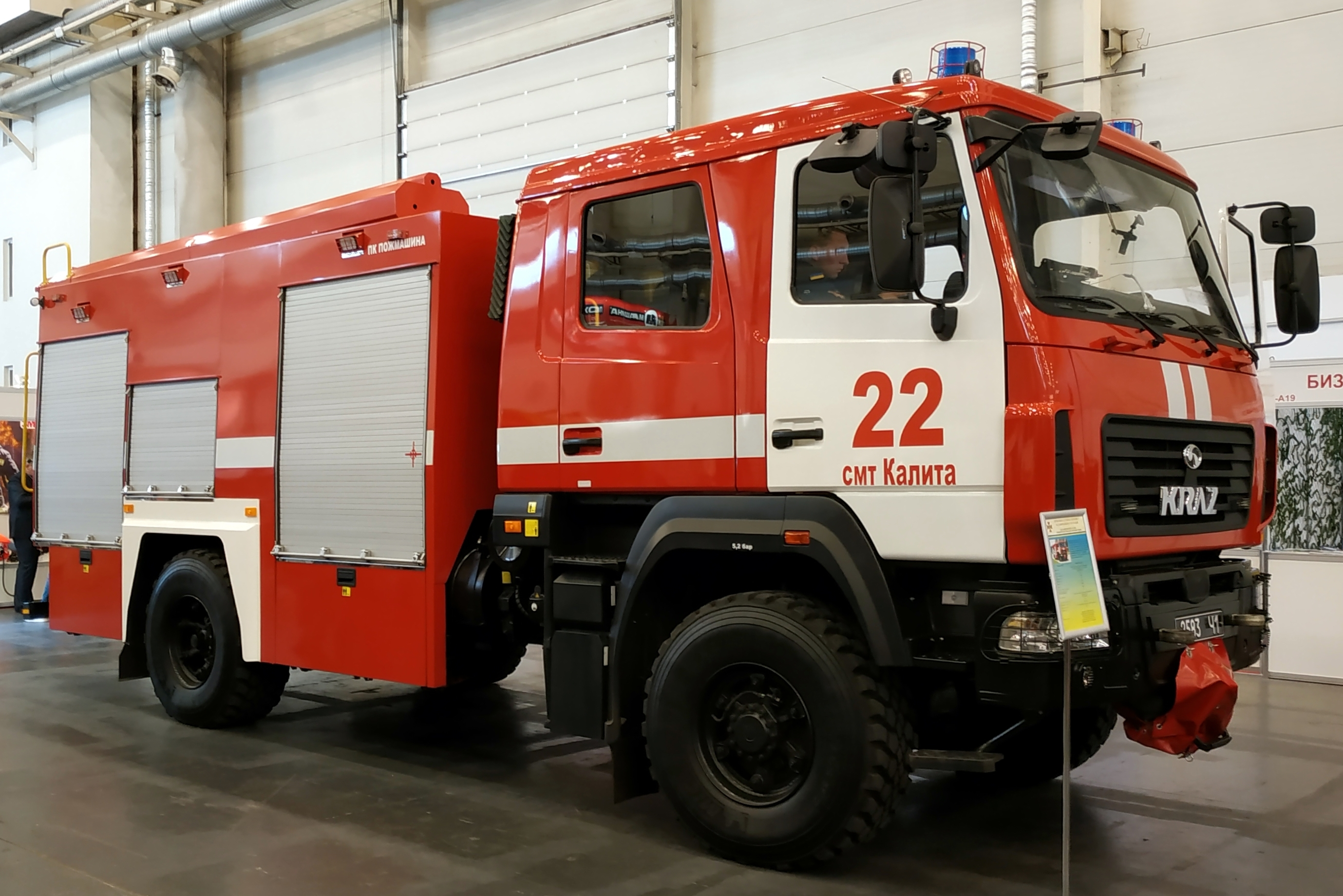 Пожарно-спасательная автоцистерна АЦ-4-60(5401НЕ)-515К на шасси автомобиля КрАЗ-5401НЕ производства ООО "Промышленная компания "Пожмашина" в экспозиции Государственной службы Украины по чрезвычайным ситуациям. Выставка "Зброя та безпека", Киев, октябрь 2018 г.